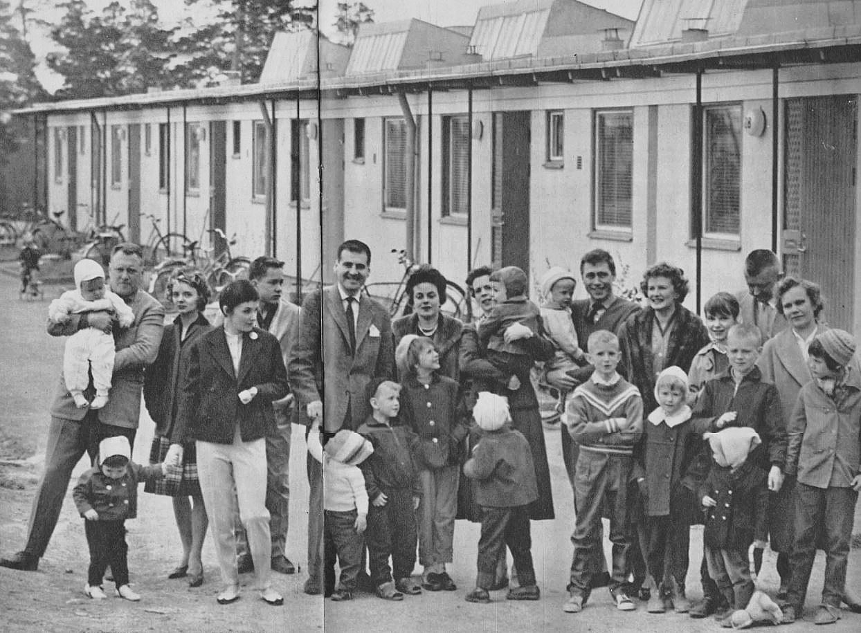 Fyra familjer i "Radiohusen", Hässelby strand. Från vänster: familj Egon Kjerrman, Catrin Westerlund, Per Persson, Lars Ramsten, Pekka och Bibi Langer, Allan Schulman.